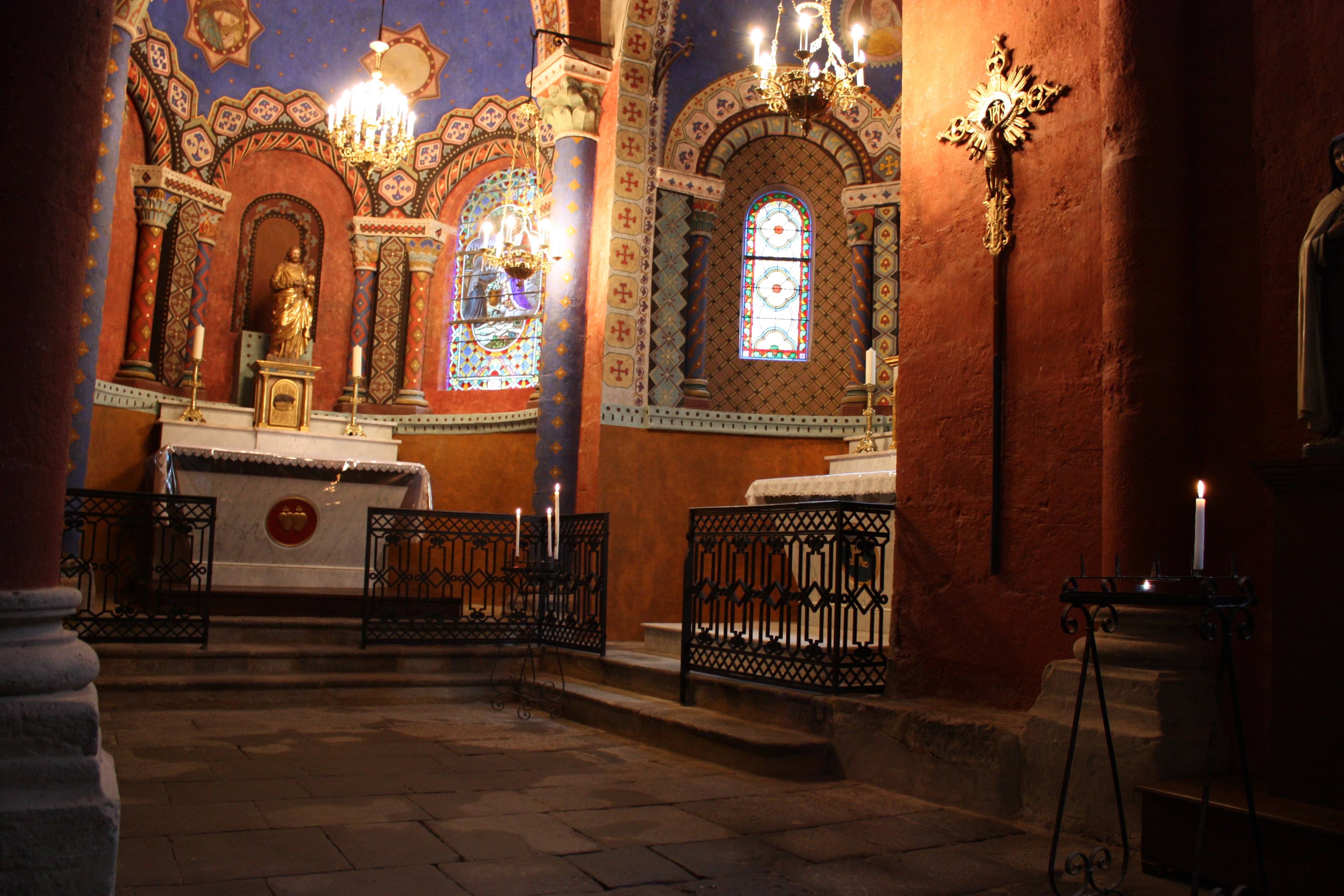 Eglise romane de Blesle